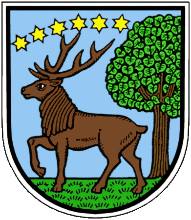 Znak města Semily získán ze stránky